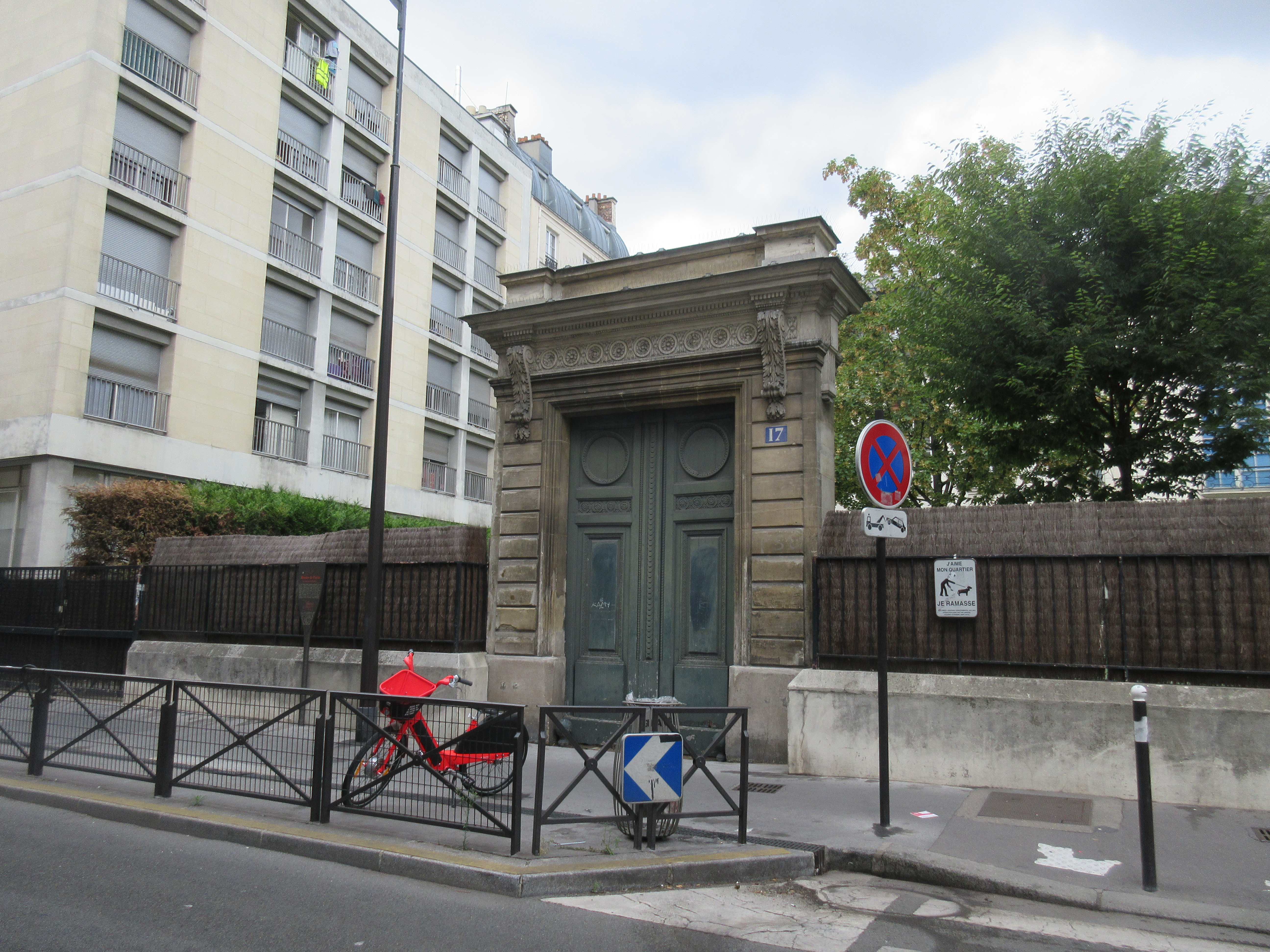 Emplacement panneau Histoire de Paris « Le Château des Ternes » situé 17 rue Pierre-Demours